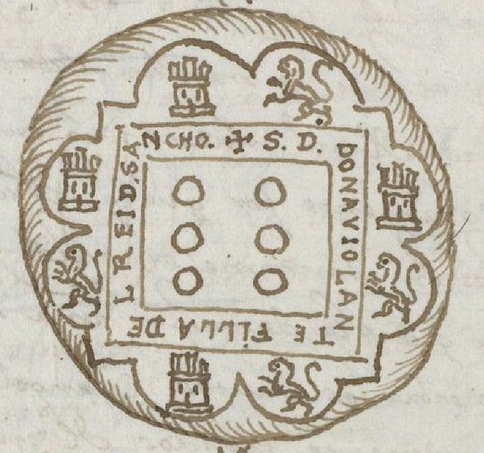 Sello de Violante Sánchez de Castilla, hija ilegítima del rey Sancho IV de Castilla y de María de Meneses. Violante Sánchez de Castilla, que era hermanastra del rey Fernando IV de Castilla, fue freila y comendadora del monasterio de Sancti Spiritus de Salamanca, en el que fue sepultada.